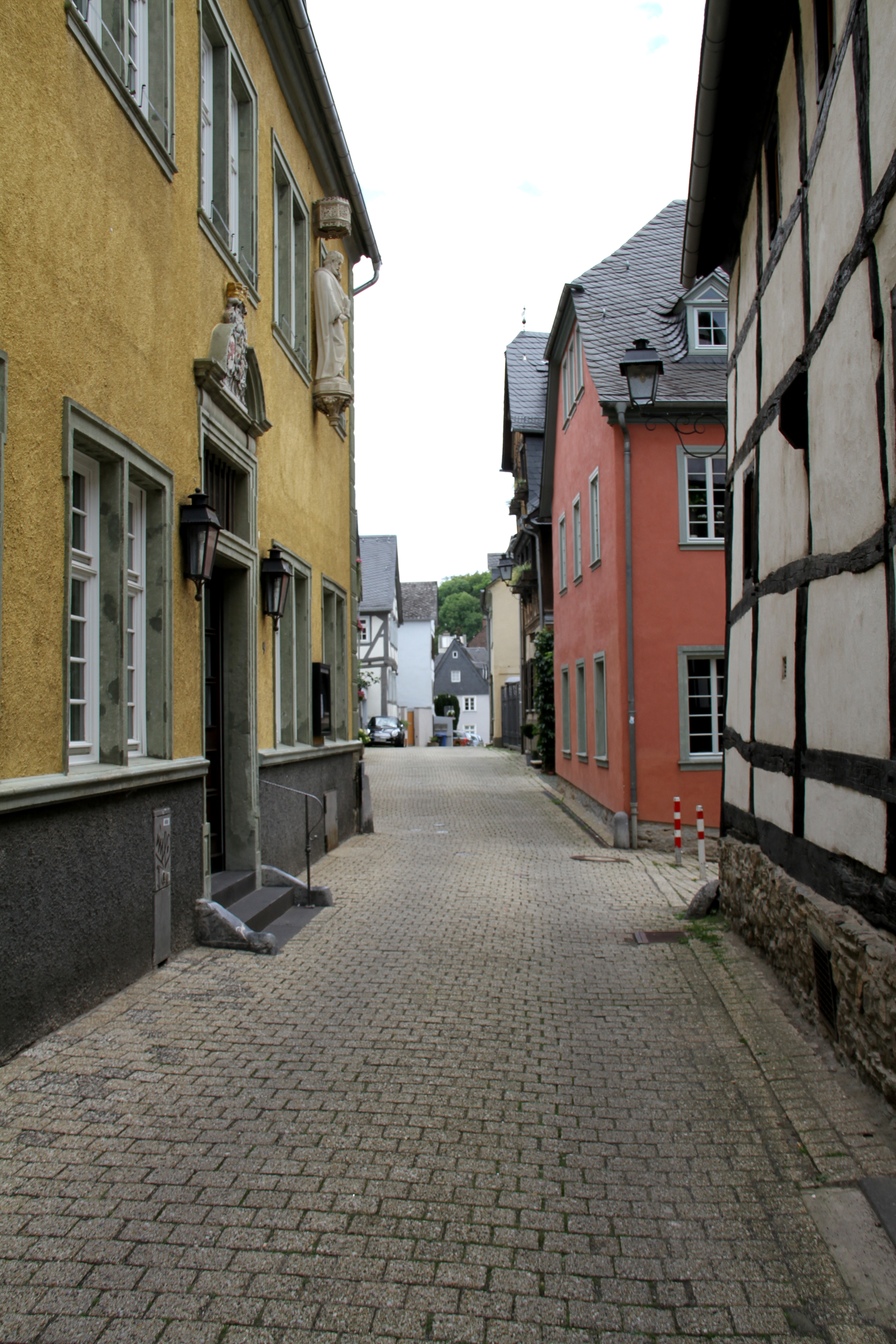 Blick Richtung Rossmarkt, auf Höhe Kolpingstraße 9 (gelbes Haus links)